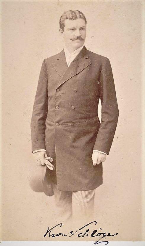 Karl von Schlözer, Carte de visite von Otto Mayer, Dresden; Niedersächsische Staats- und Universitätsbibliothek Göttingen, Schlözer-Stiftung Bilder KS 123